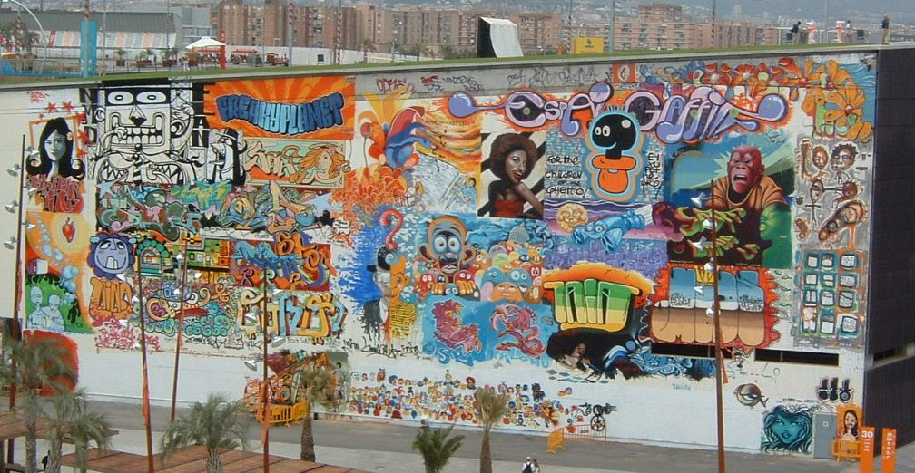 Photographie personnelle prise au Forum de Barcelone 2004 publiée sous licence GFDL. Fresque de tags sur un mur consacré (détail).